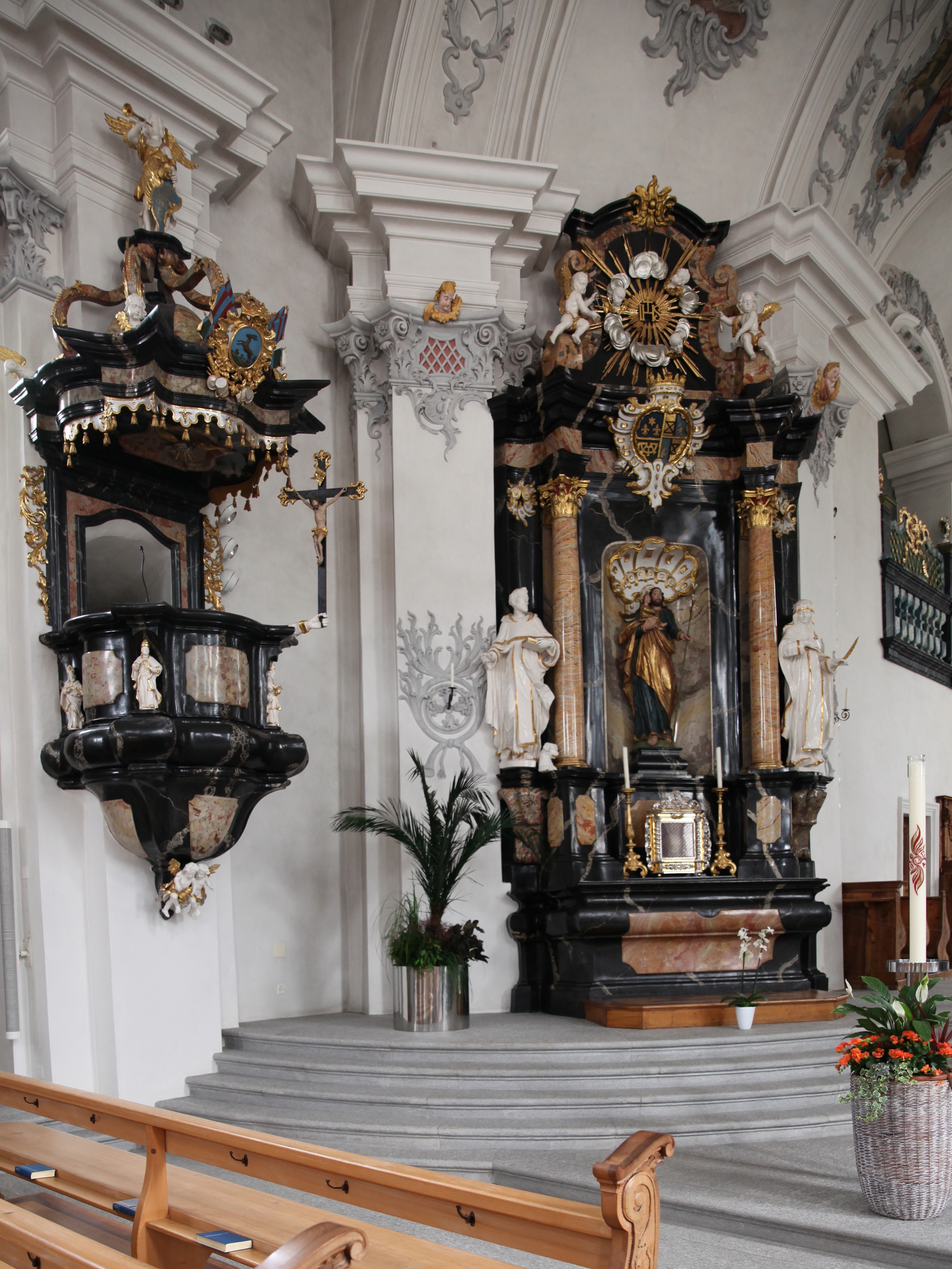 Andermatt, Katholische Pfarrkirche St. Peter und Paul, Kanzel und linker Seitenaltar